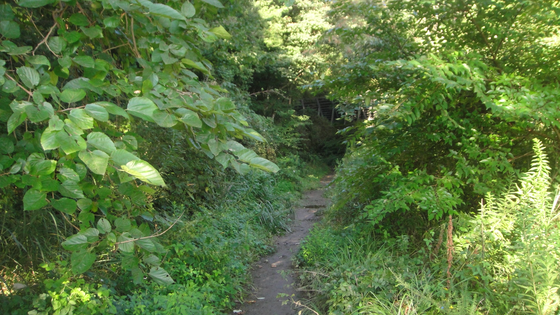 飯能市にある埼玉県道28号青梅飯能線の旧道区間